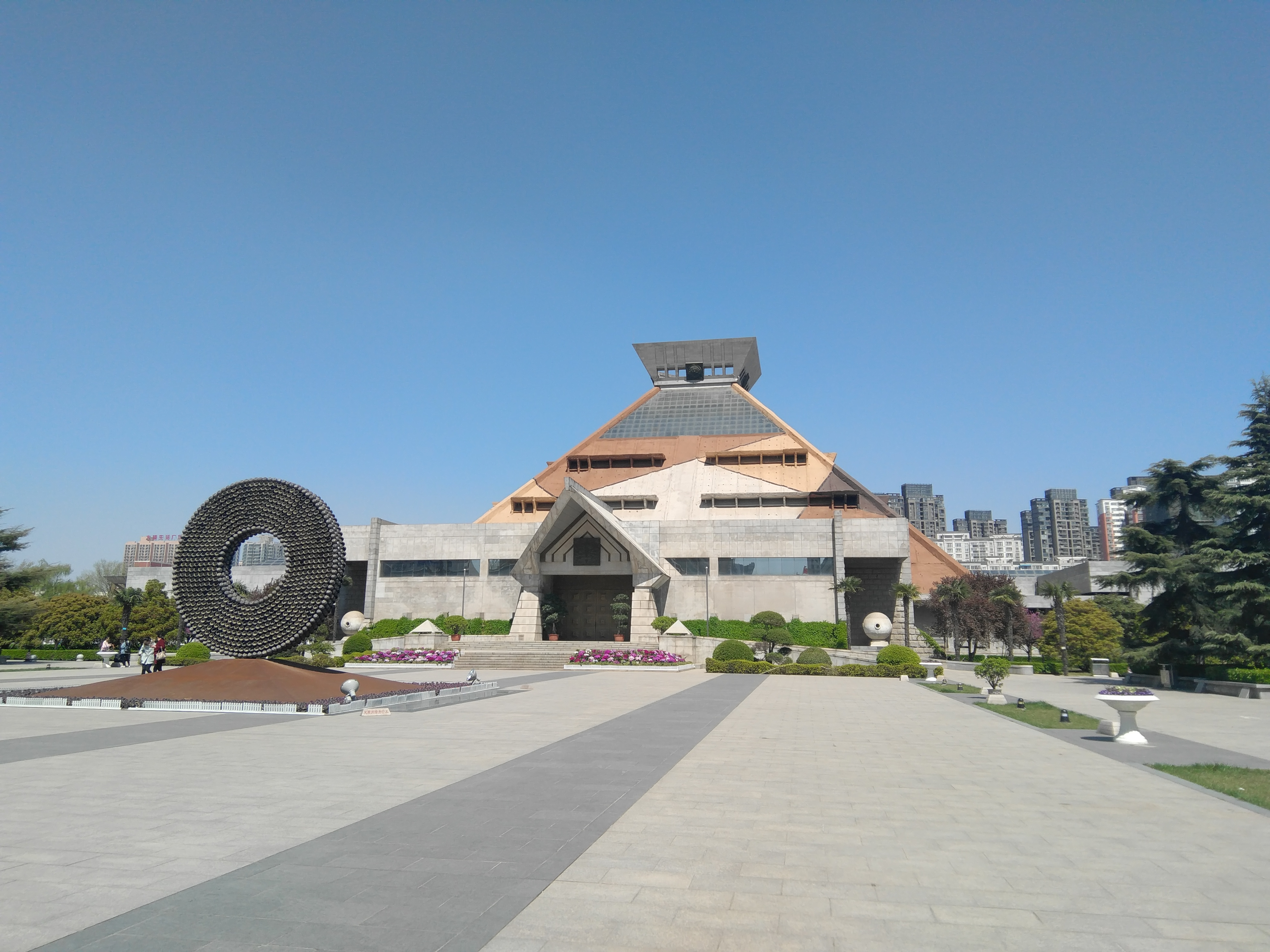 河南博物院